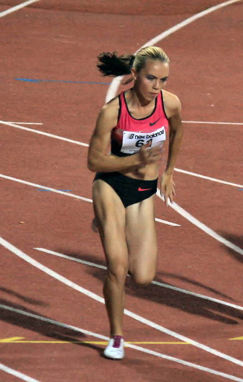 לנסקי אולגה (מכבי י.ג. ריאלי ראשל"צ), מקצה 1 במוקדמות ריצת 100 מטר נשים, תחרות הלילה של איגוד האתלטיקה בישראל, "אצטדיון האתלטיקה ראשון לציון", 29 ביולי 2013.